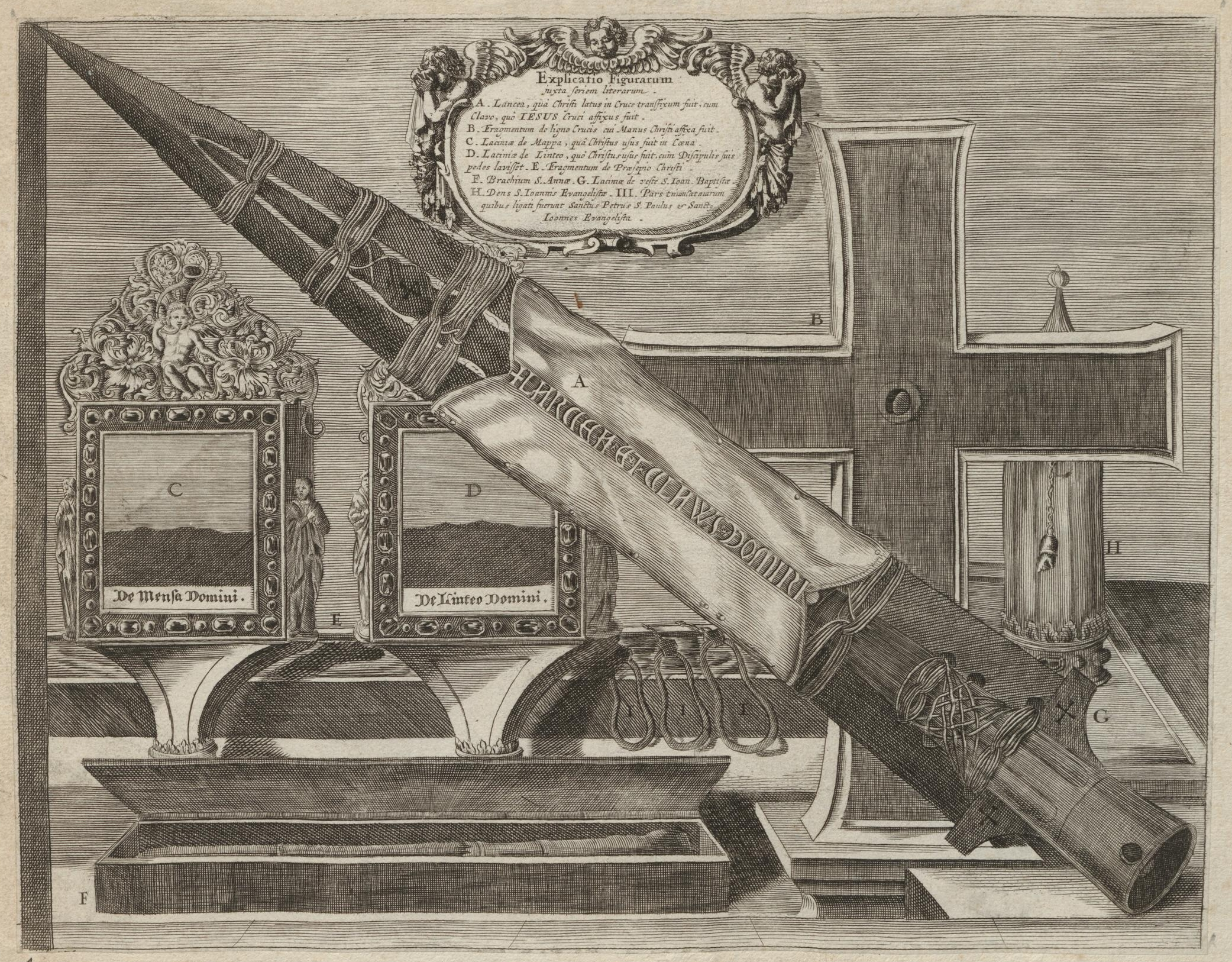 Grafik aus dem Klebeband Nr. 16 („Leichbegängnisse“) der Fürstlich Waldeckschen Hofbibliothek Arolsen Motiv: „Abbildung des Großen Heiligthums zu Nürnberg“ Verlag: Peter Conrad Monath, Nürnberg